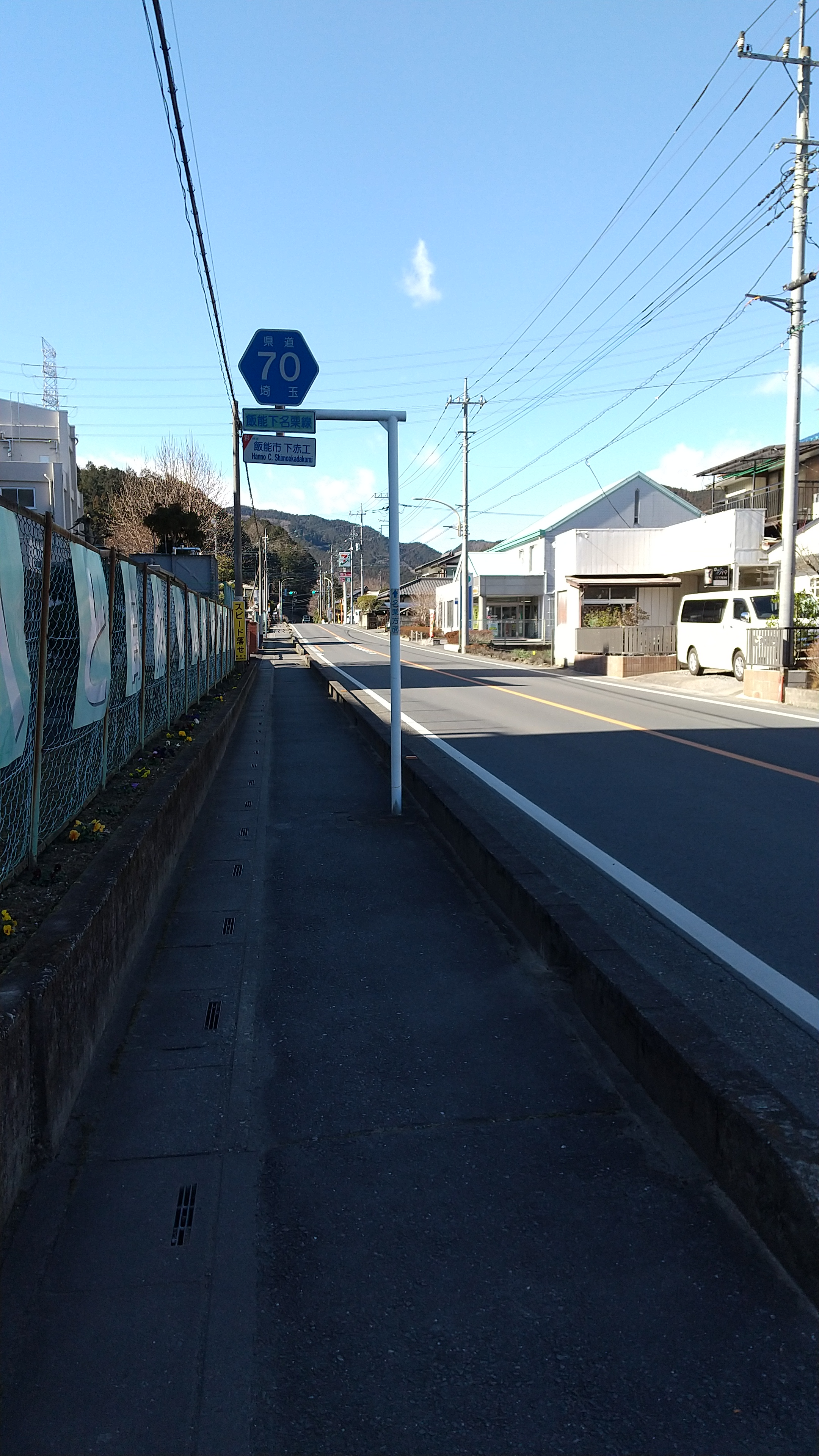 2020年2月撮影 飯能市上赤工周辺Saitama prefectural